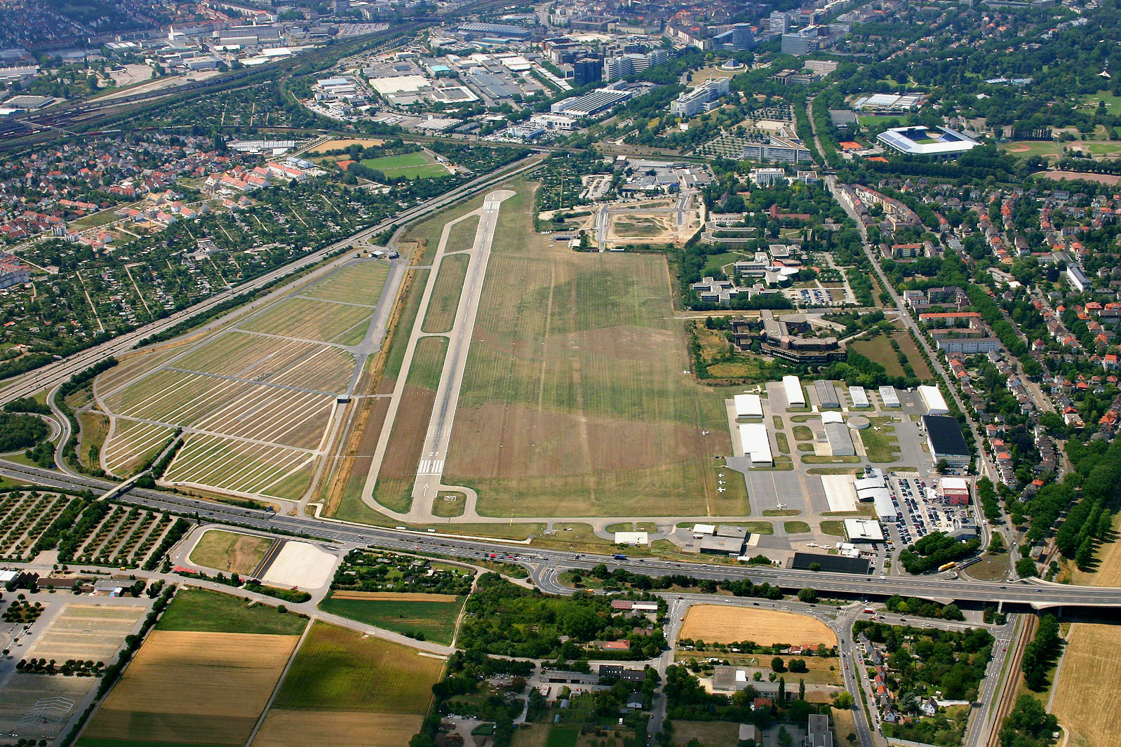 Luftaufnahme vom Flugplatz Mannheim mit Blick Richtung Westen.